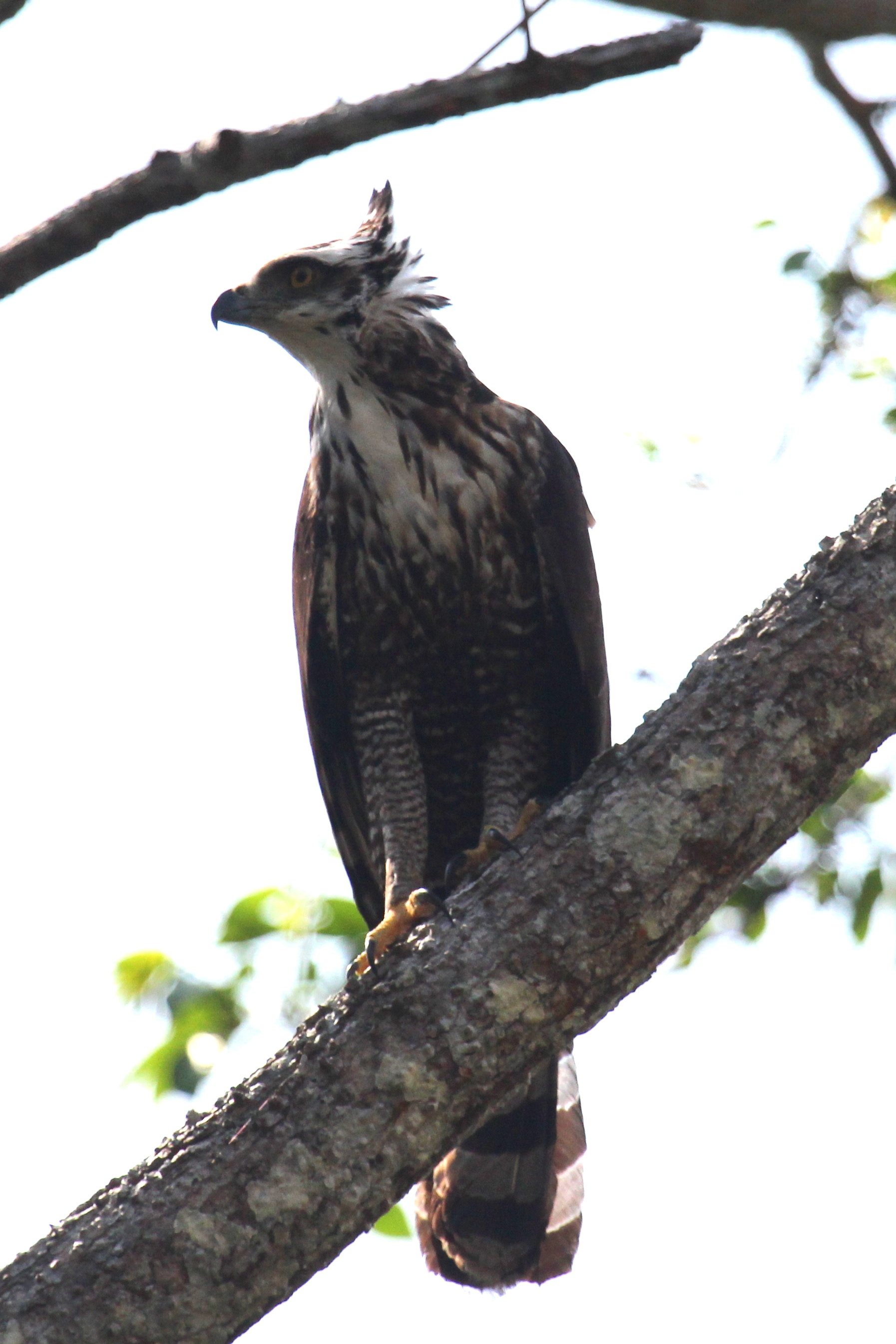 Juvenile